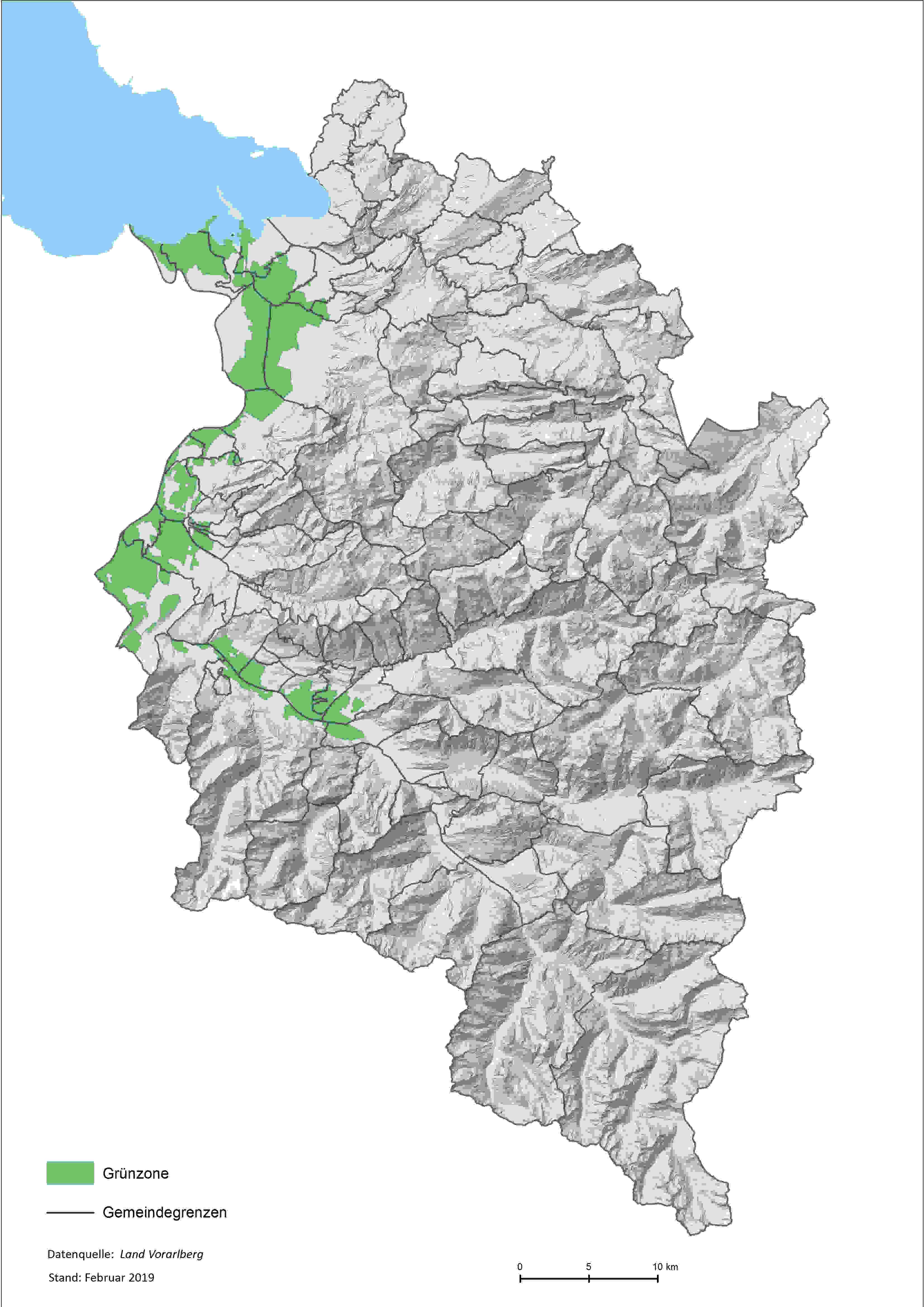 Karte der Landesgrünzone in Vorarlberg. Quelle: Amt der Vorarlberger Landesregierung, Überörtliche Raumplanung, Abteilung Raumplanung und Baurecht (VIIa), A-6901 Bregenz, Vorarlberg, Österreich. Freigegeben gemäß